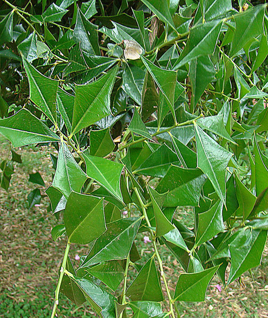 Sombra del Toro is noteable for its unusual leaves. Buenos Aires. In context at